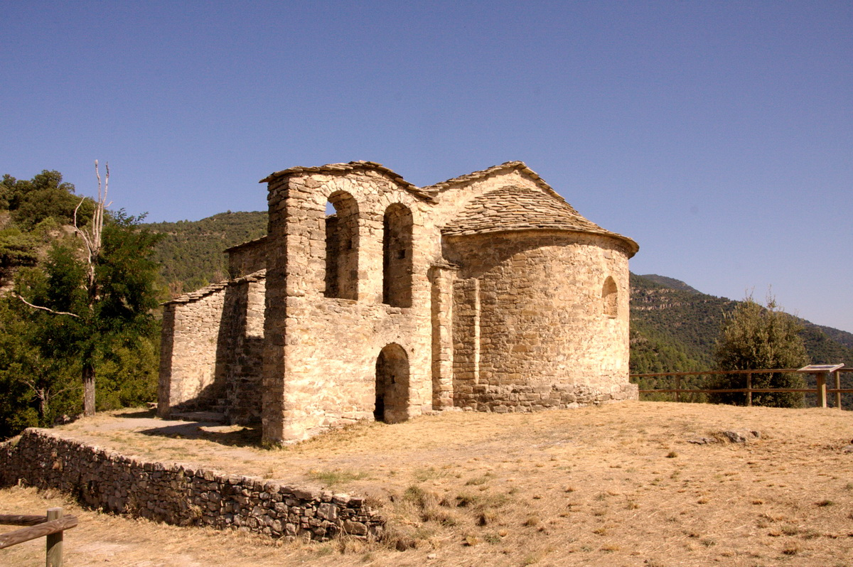 Ermita de la Pietat a Santa Llestra (la Franja-Osca)